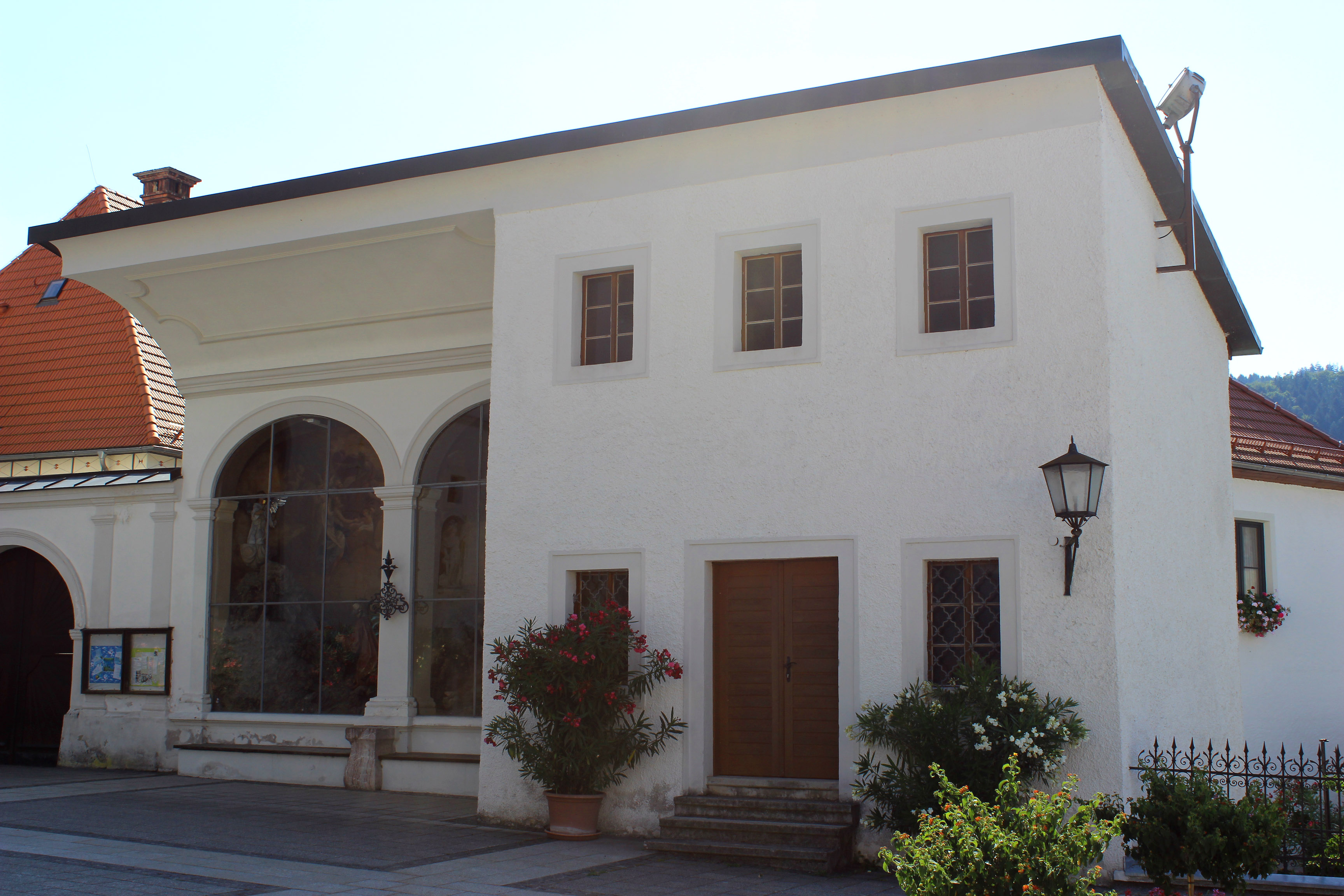 Scheibbs, Ehemaliges Totengräberhaus und Ölberg